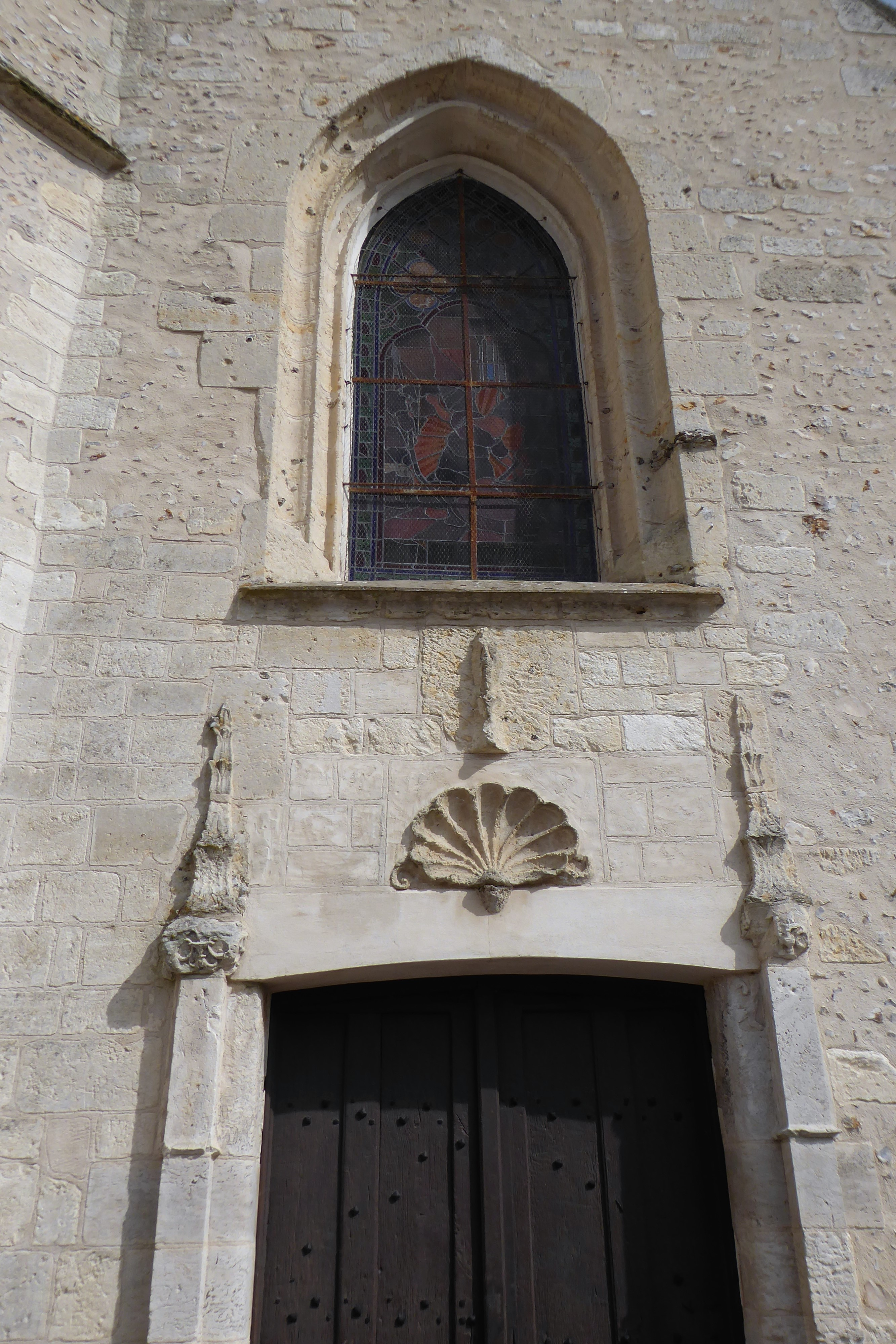 entrée de l'église Saint-Pierre, surmontée d'une coquille Saint-Jacques, Vert-en-Drouais, Eure-et-Loir, France.